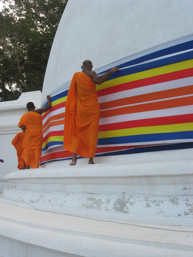 Somawathiya Stupa